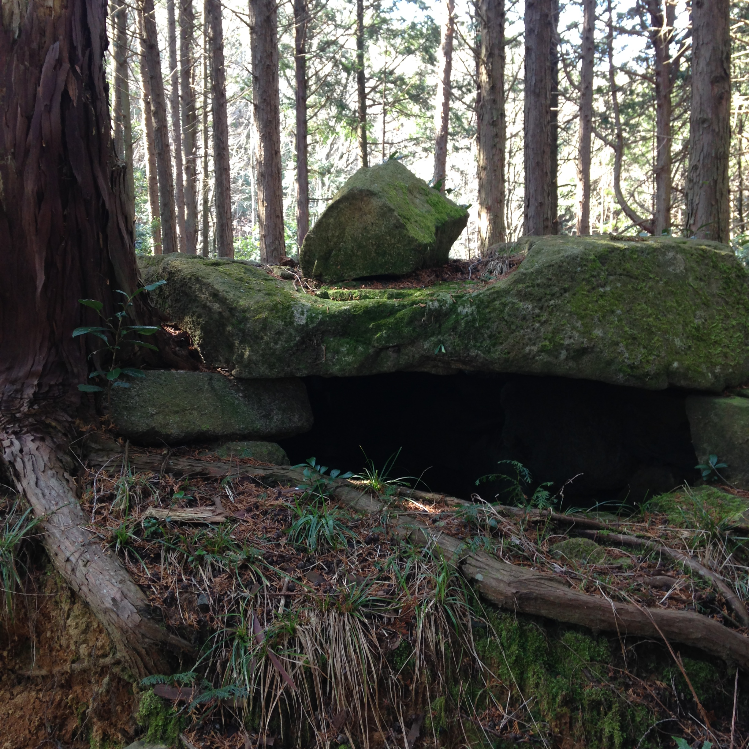 和束町にある坂尻古墳